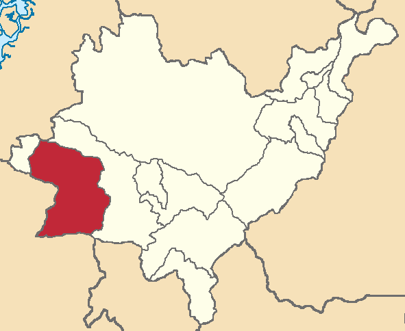 Mapa localizacor del cantón en Azuay, Ecuador